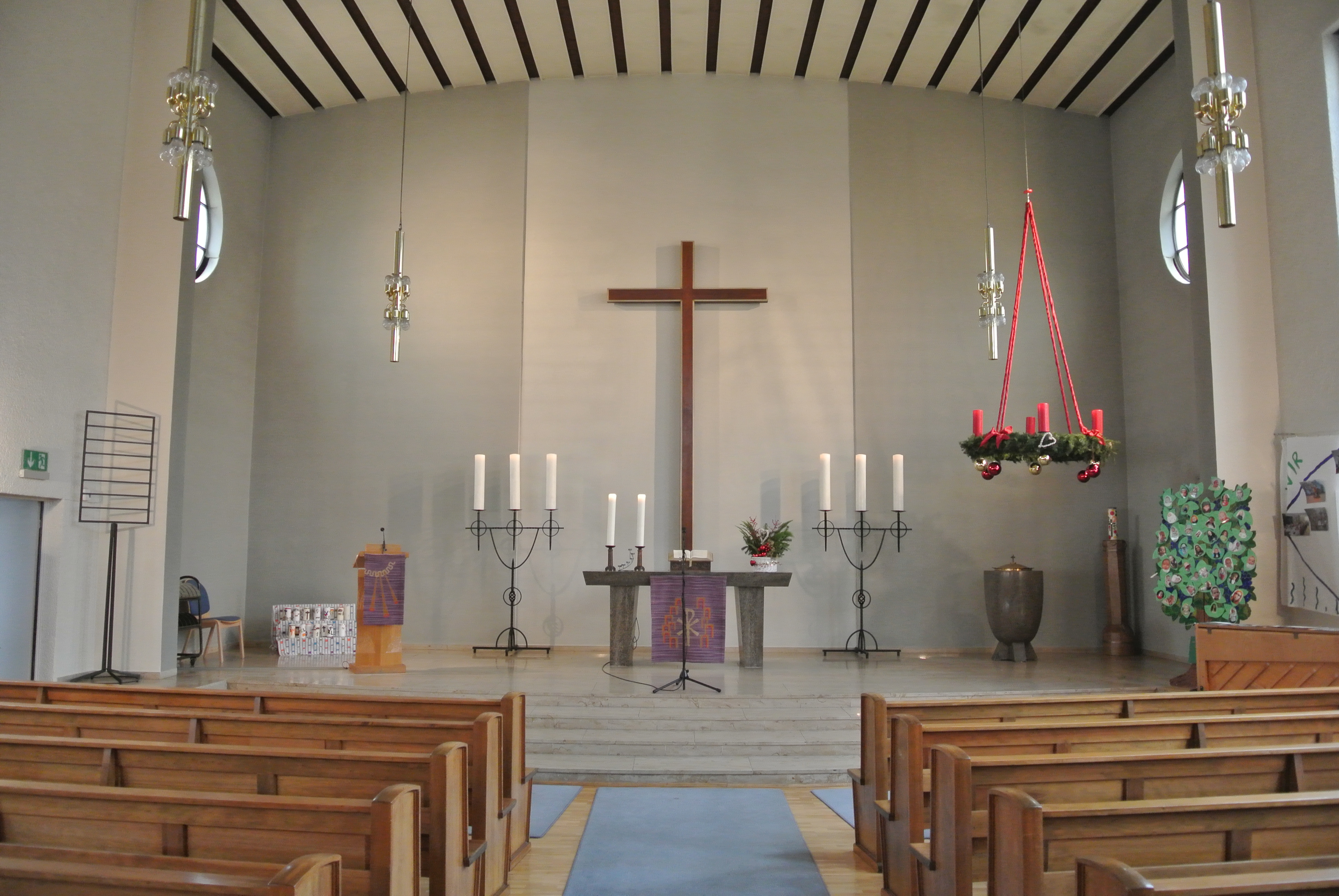 Evangelische Dankeskirche in Frankfurt-Schwanheim-Goldstein, Am Goldsteinpark 1, Baujahr 1954, Architekt Ernst Görcke, Altarraum